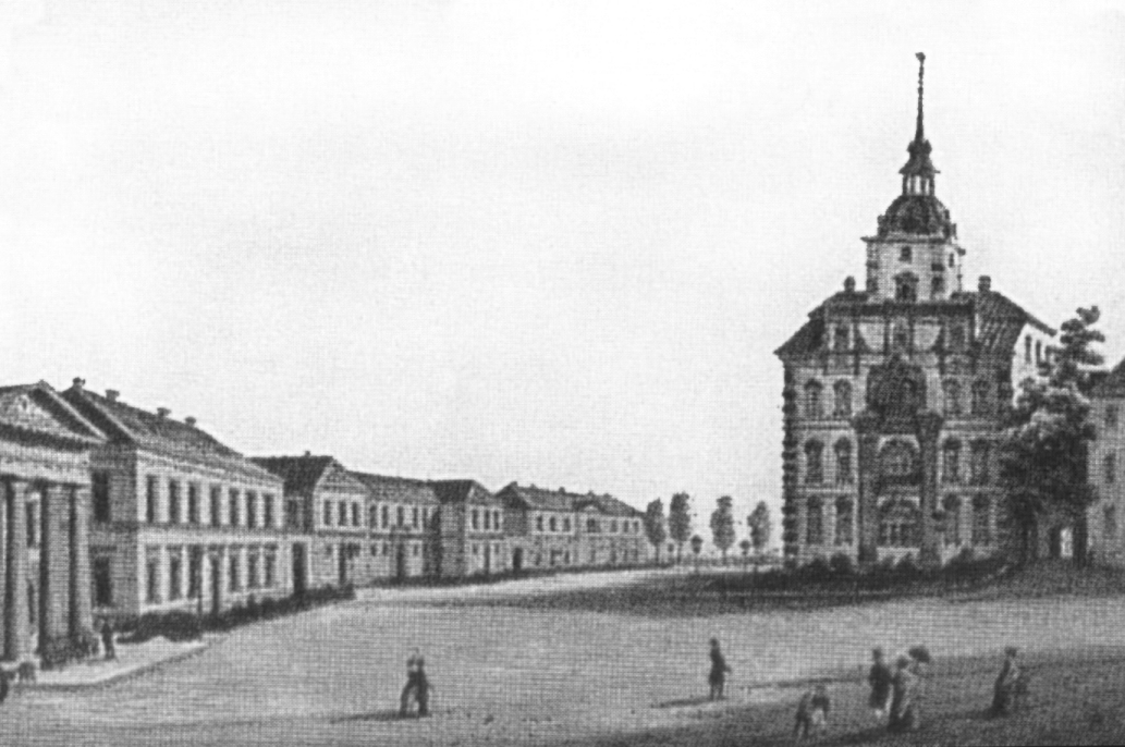 Oldenburger Schloss